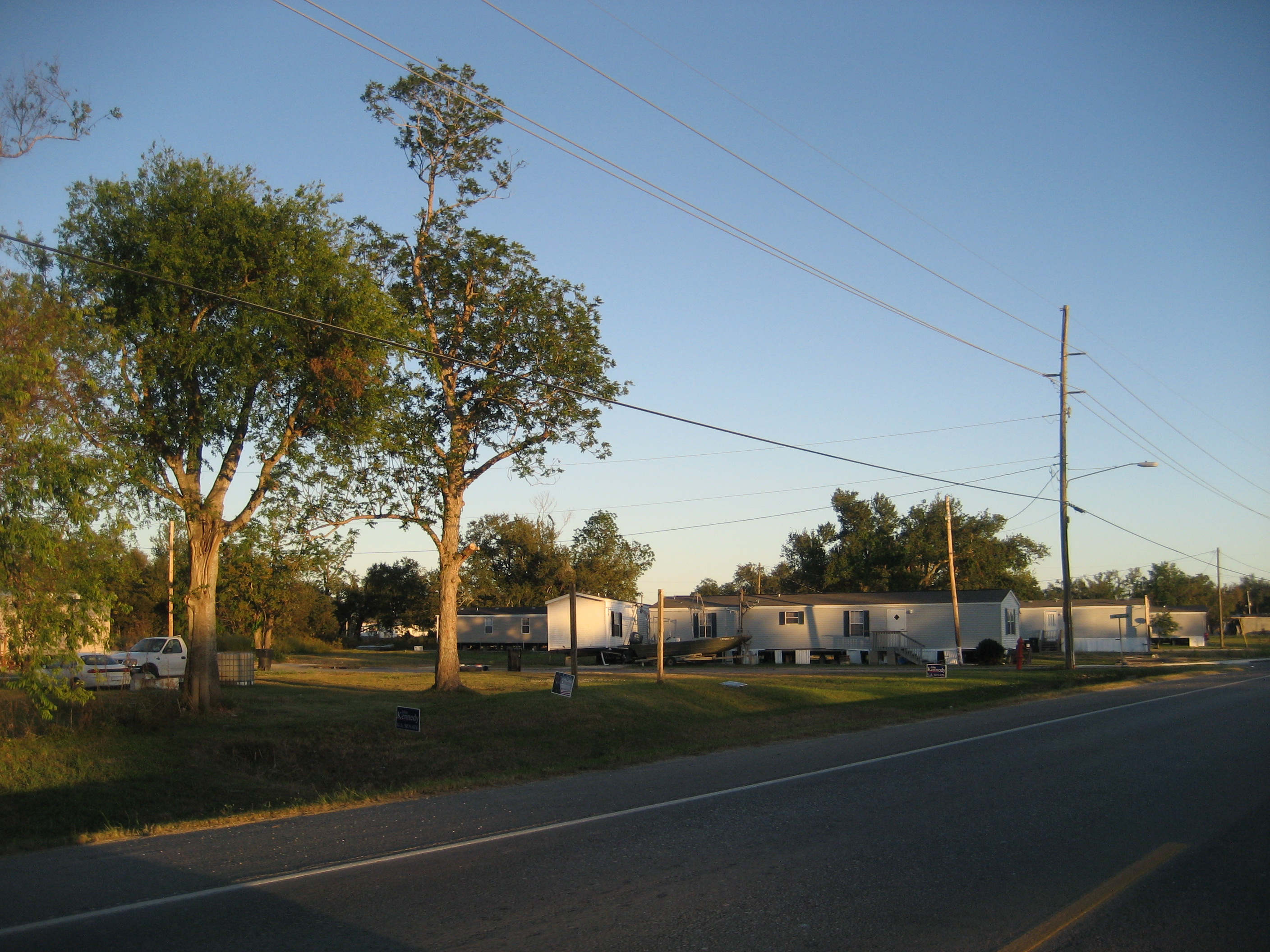 Port Sulphur, Louisiana